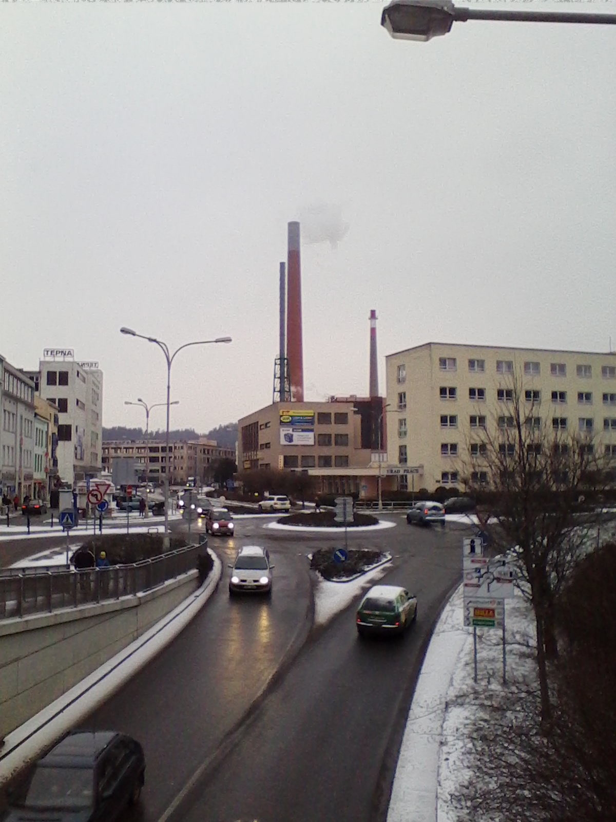 Hlavní silnice I/14 a kouřící komín Náchodské teplárny (Plhovská 544).